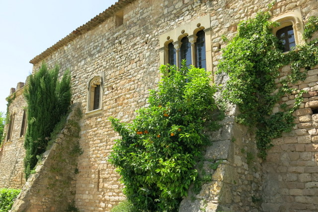 castell de Piera,Comarca Anoia - Catalunya